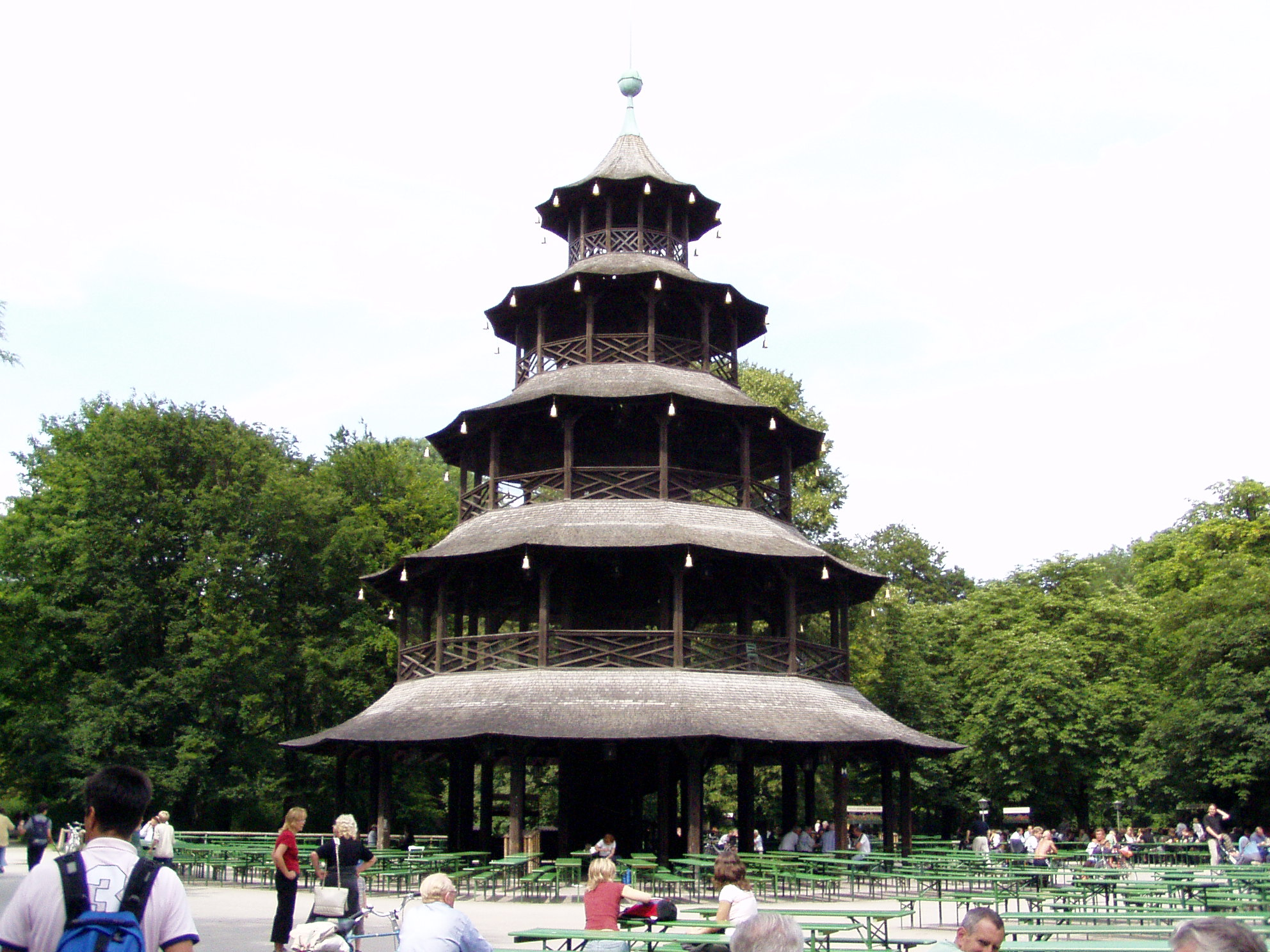 Der Chinesische-Turm im Englischen Garten